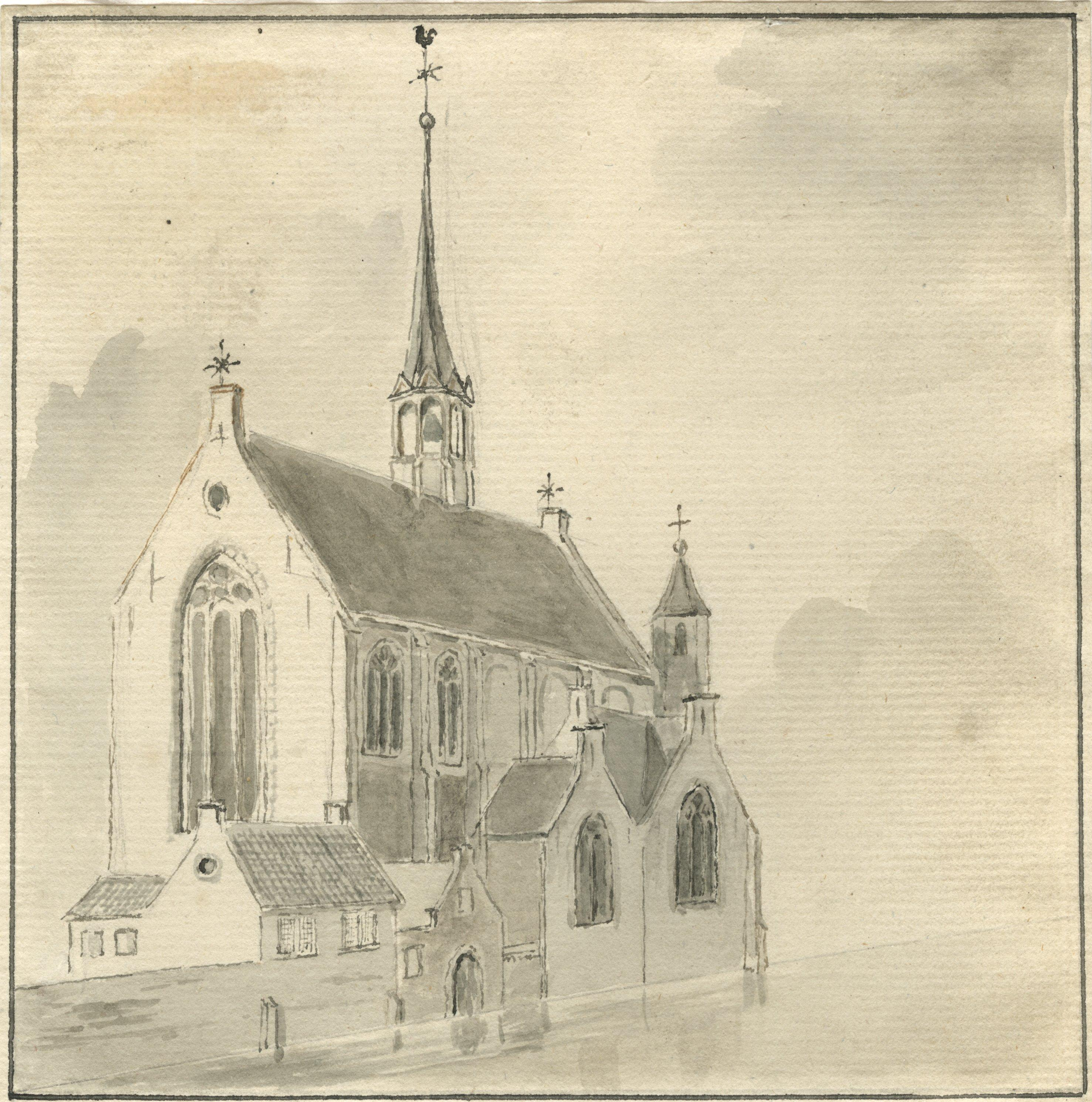 De Hofkapel op het Binnenhof gezien vanaf de Hofvijver